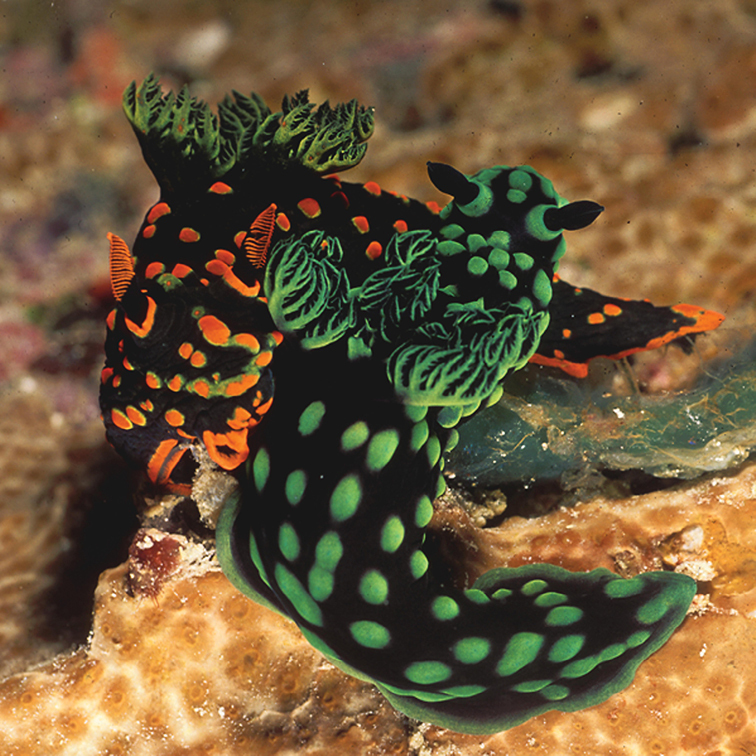 Nembrotha guttata y N. cristata, Maldivas